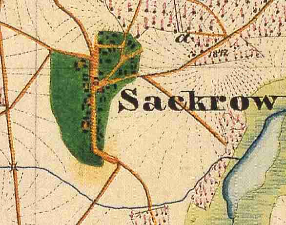 Sacrow, Ortsteil der Gemeinde Spreewaldheide, Landkreis Dahme-Spreewald, Brandenburg, Deutschland, Ausschnitt aus dem Urmesstischblatt 4050 Straupitz von 1846